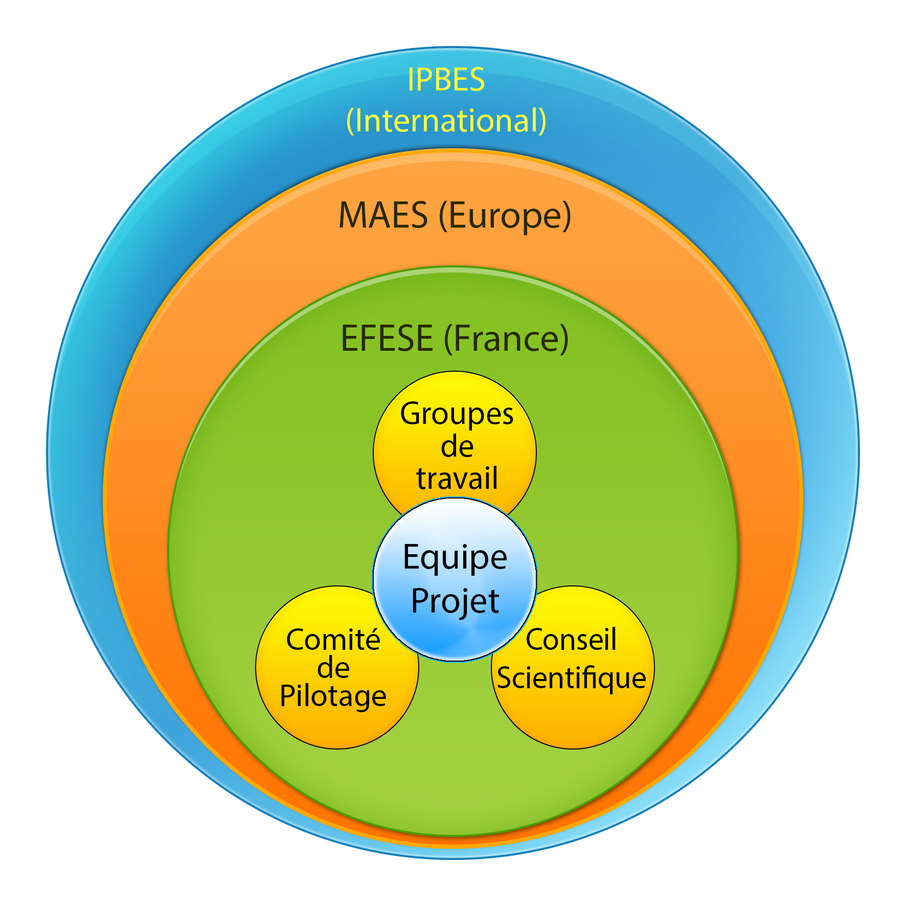 Image représentant le programme EFESE